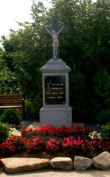 Wassermühle in der Stadt Mönchengladbach